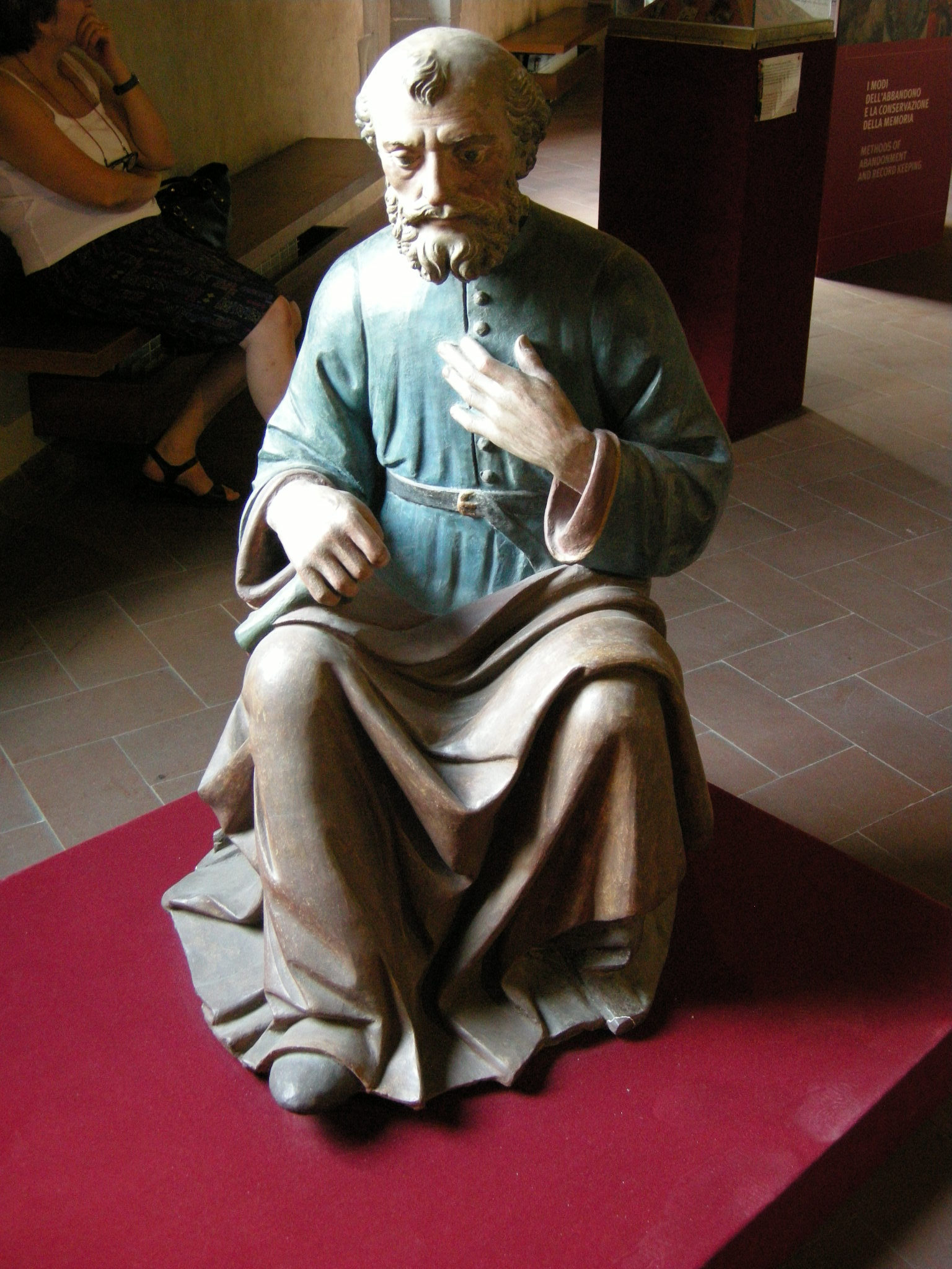 Fra mattia della robbia, san giuseppe, 1505 circa